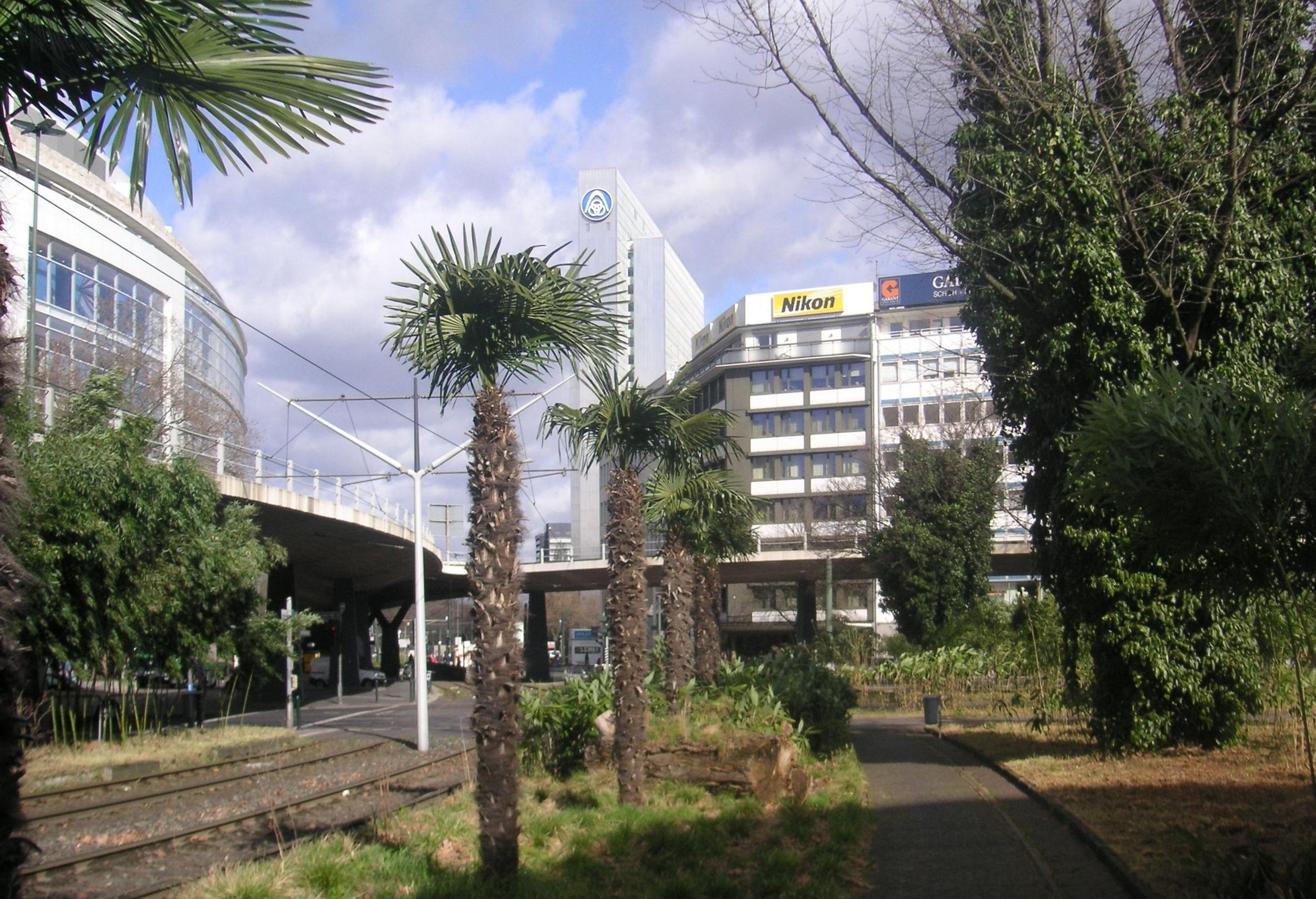 Blick von der Berliner Allee Richtung Tausendfüßler, Bepflanzung von Tita Giese.